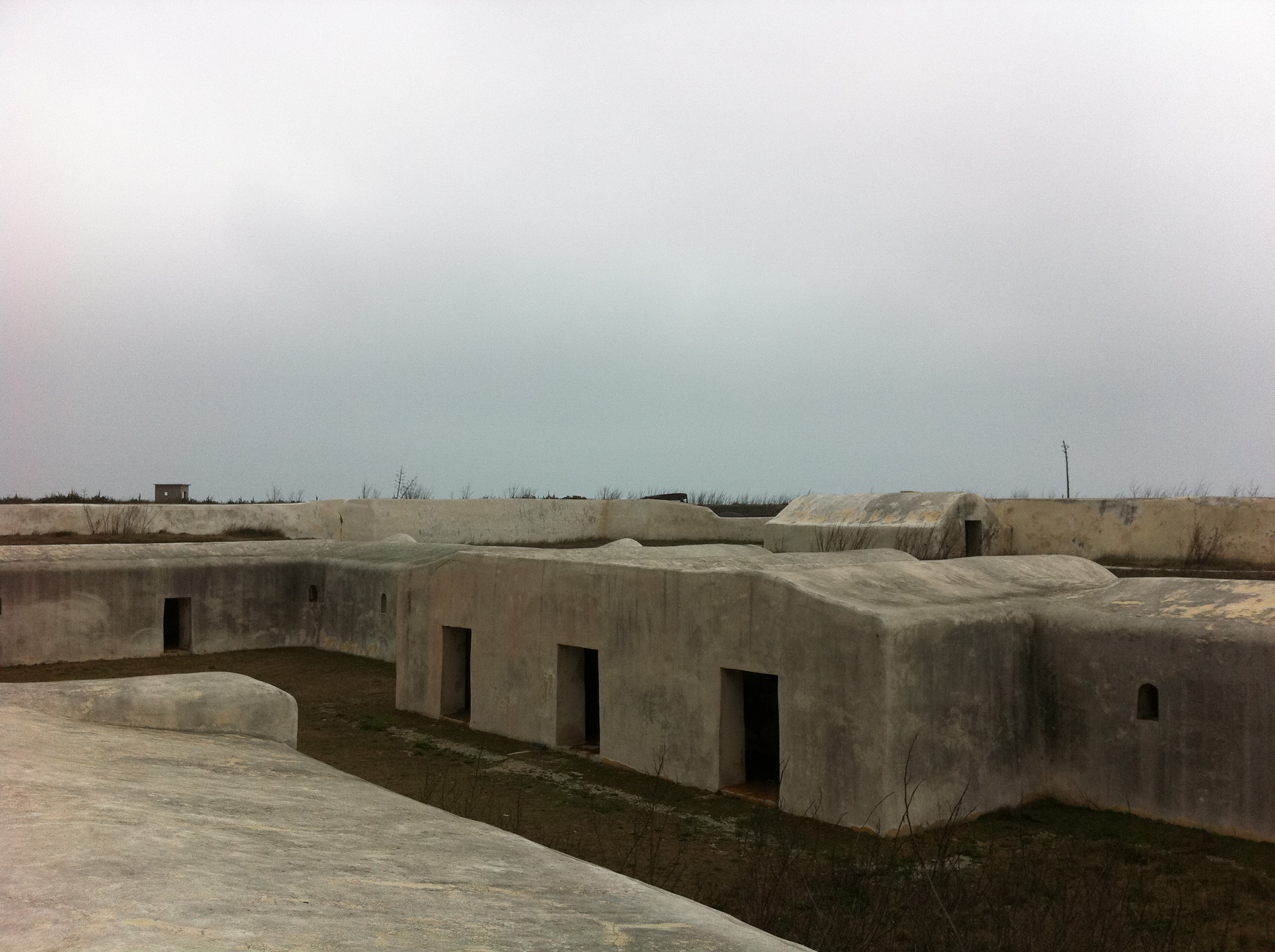 中文（台灣）: 澎湖西嶼東砲台內部。